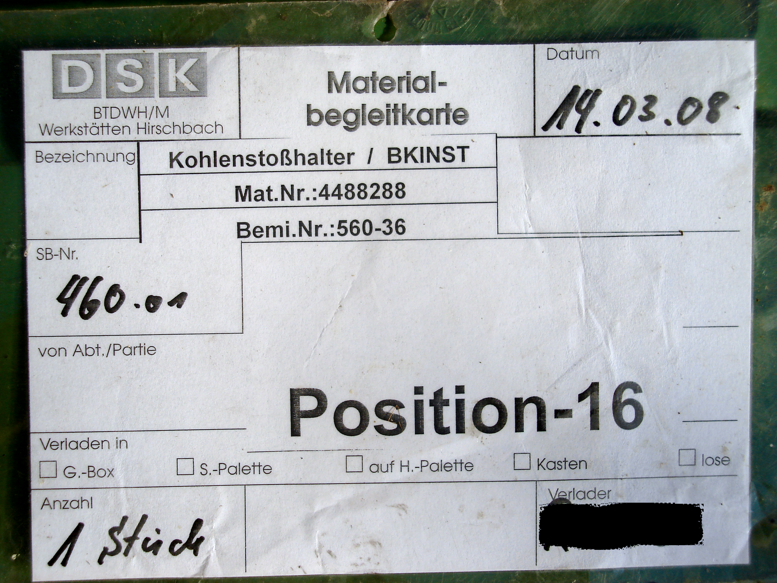 Materialbegleitkarte Kohlenstoßhalter